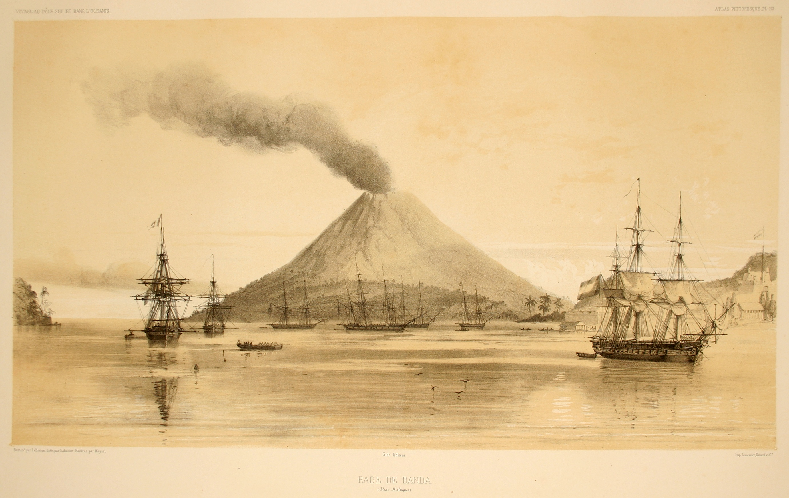 Rade de Banda. Atlas pittoresque, planche 113